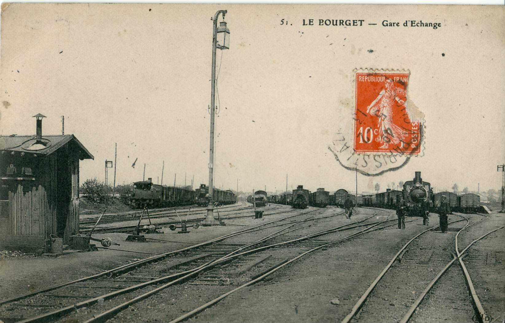 Carte postale ancienne éditée par LL N°51 LE BOURGET - Gare d'échange